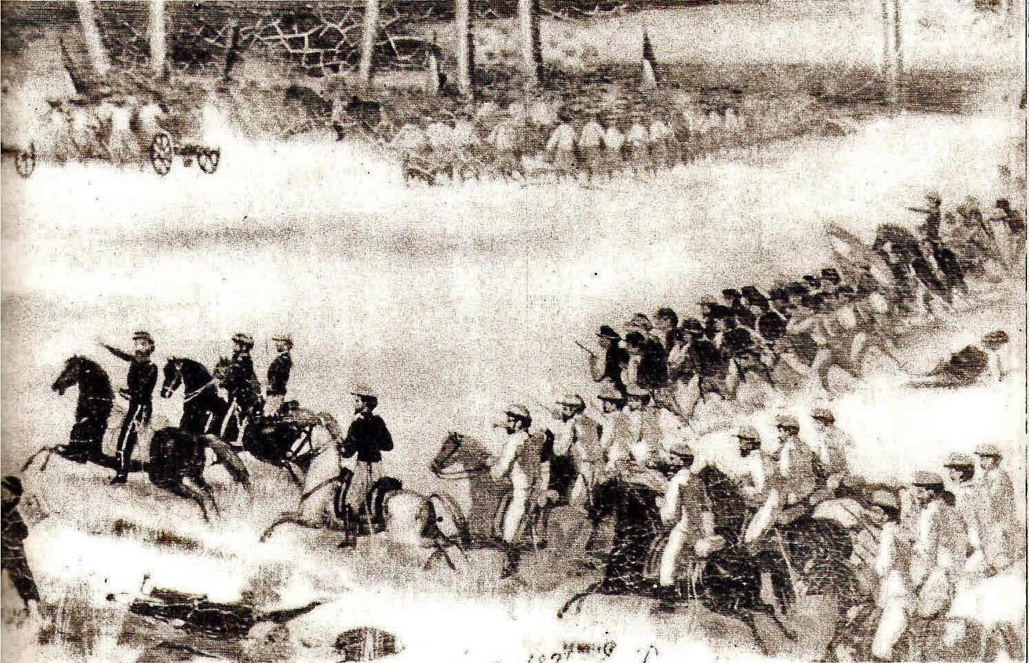 Dibujo de Enrique Pinaroli, firmado en Goya (1871), Corrientes, que muestra la acción de la Batalla de Ñaembé.